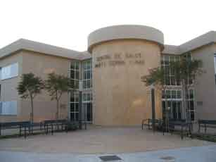 Centre de Salut Marti Serra i Mas